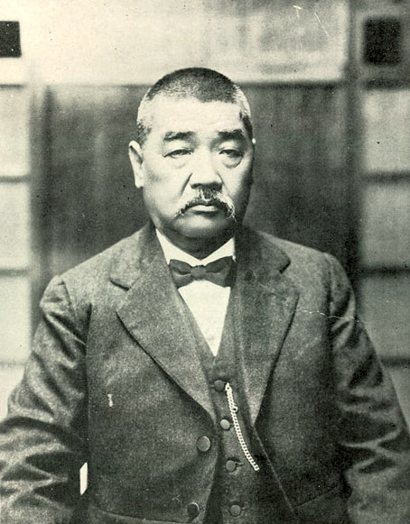 Bân-lâm-gú: Koeh Chhun-iong 郭春秧